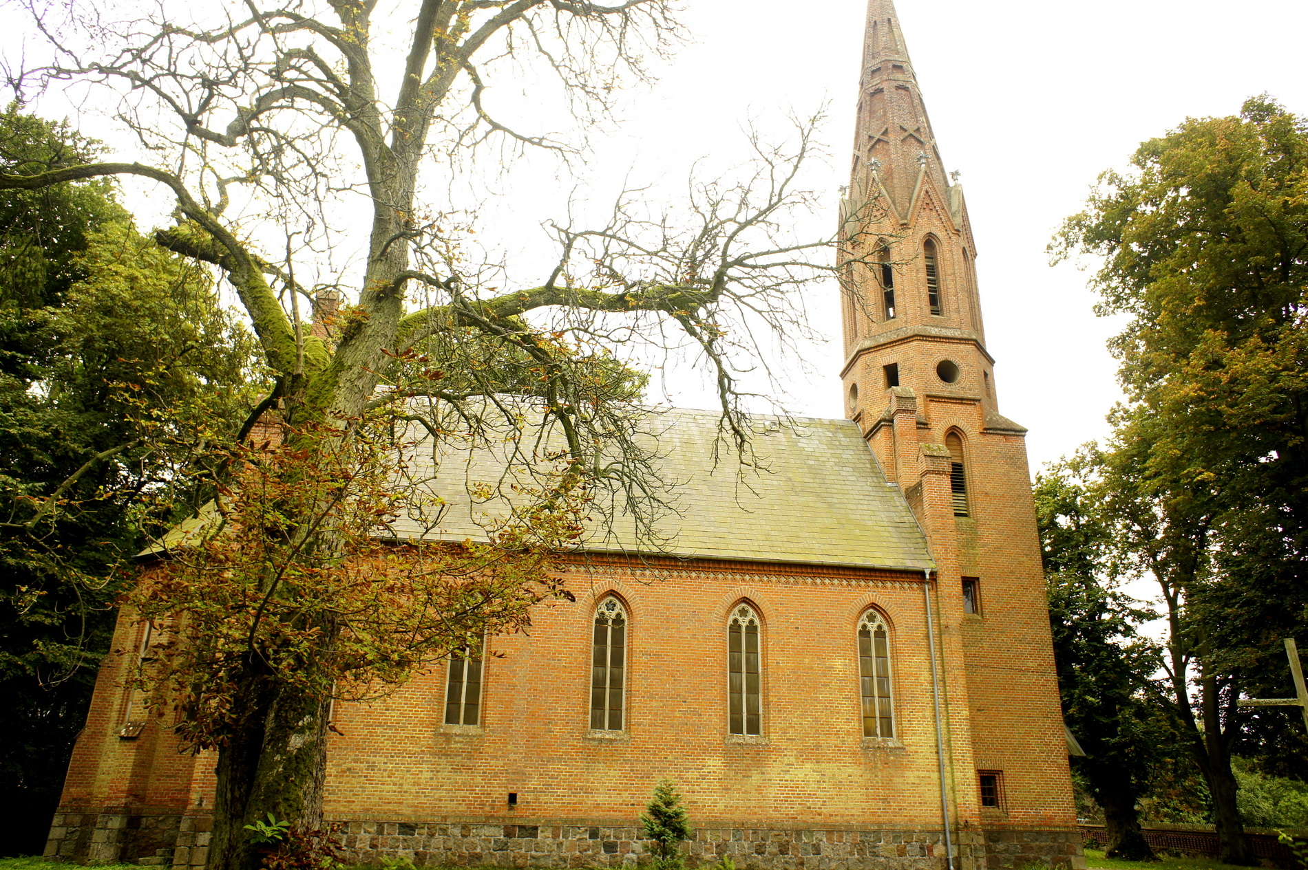 Danków, kościół pod wezwaniem Najświętszego Serca Pana Jezusa